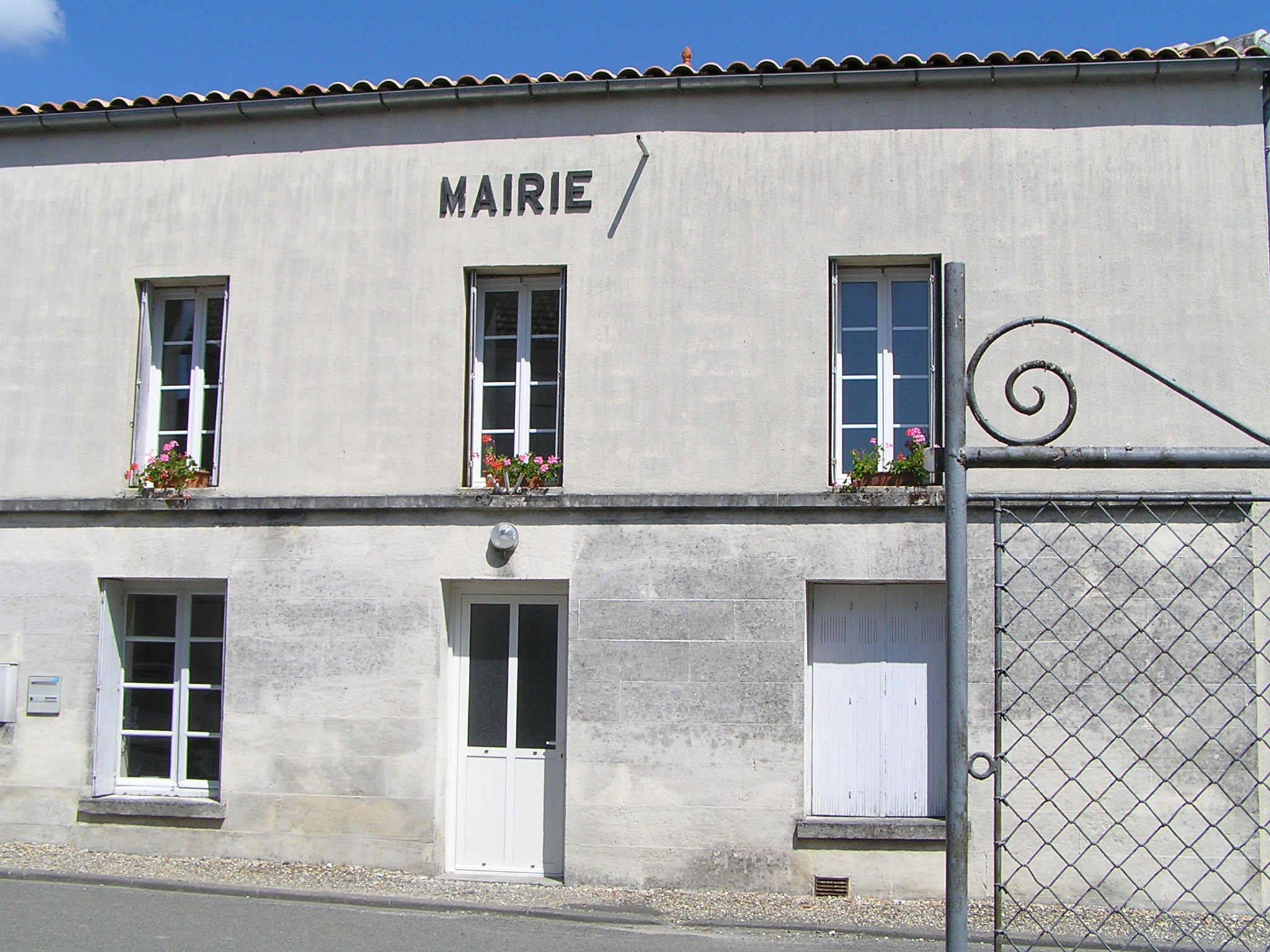 Mairie d' Ambleville